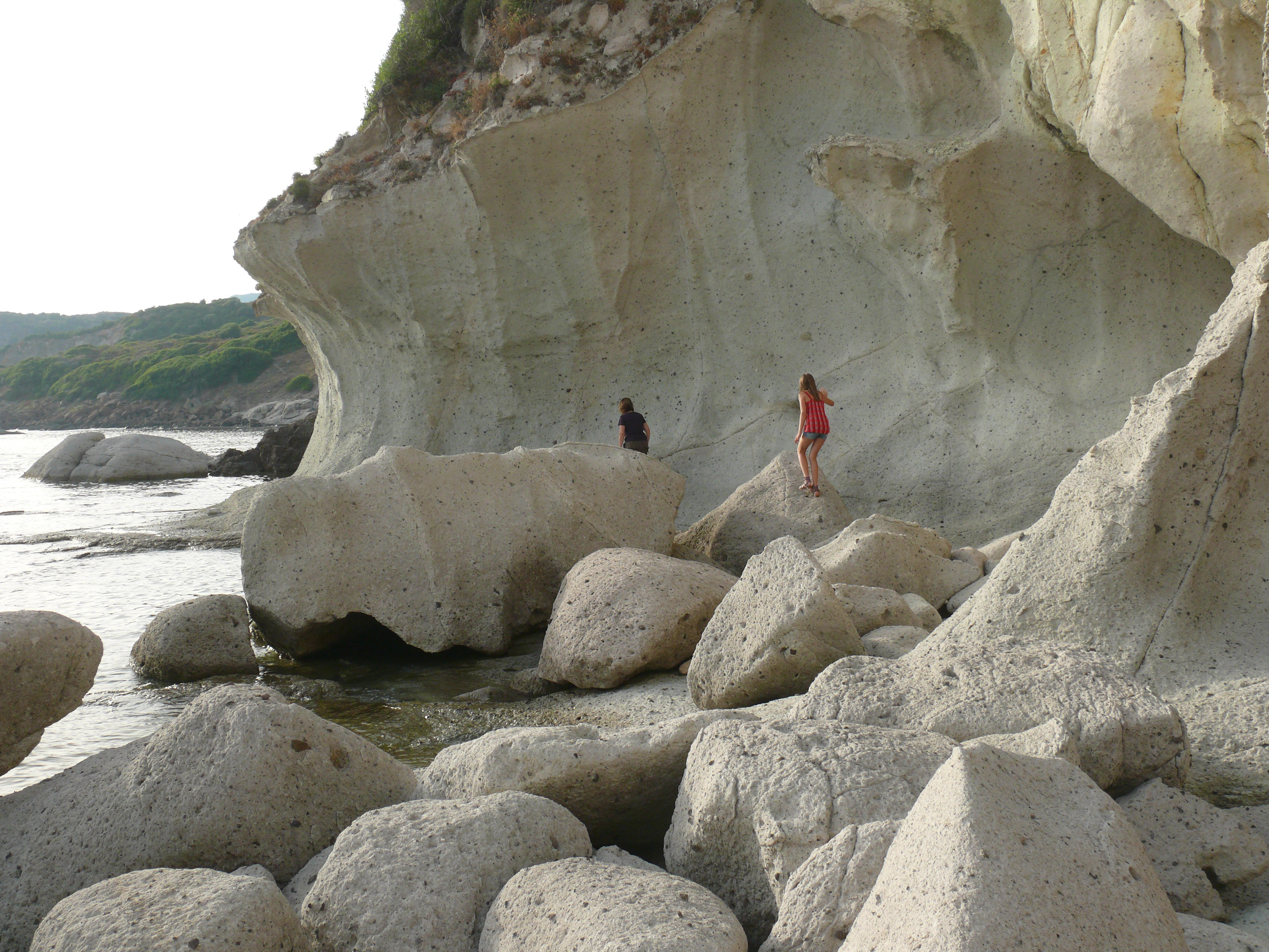 Brandungshohlkehle an der Westküste Sardiniens; Bild wird im auf Martin Wagenschein basierenden Lehrstücks "Wettersteine" verwendet.